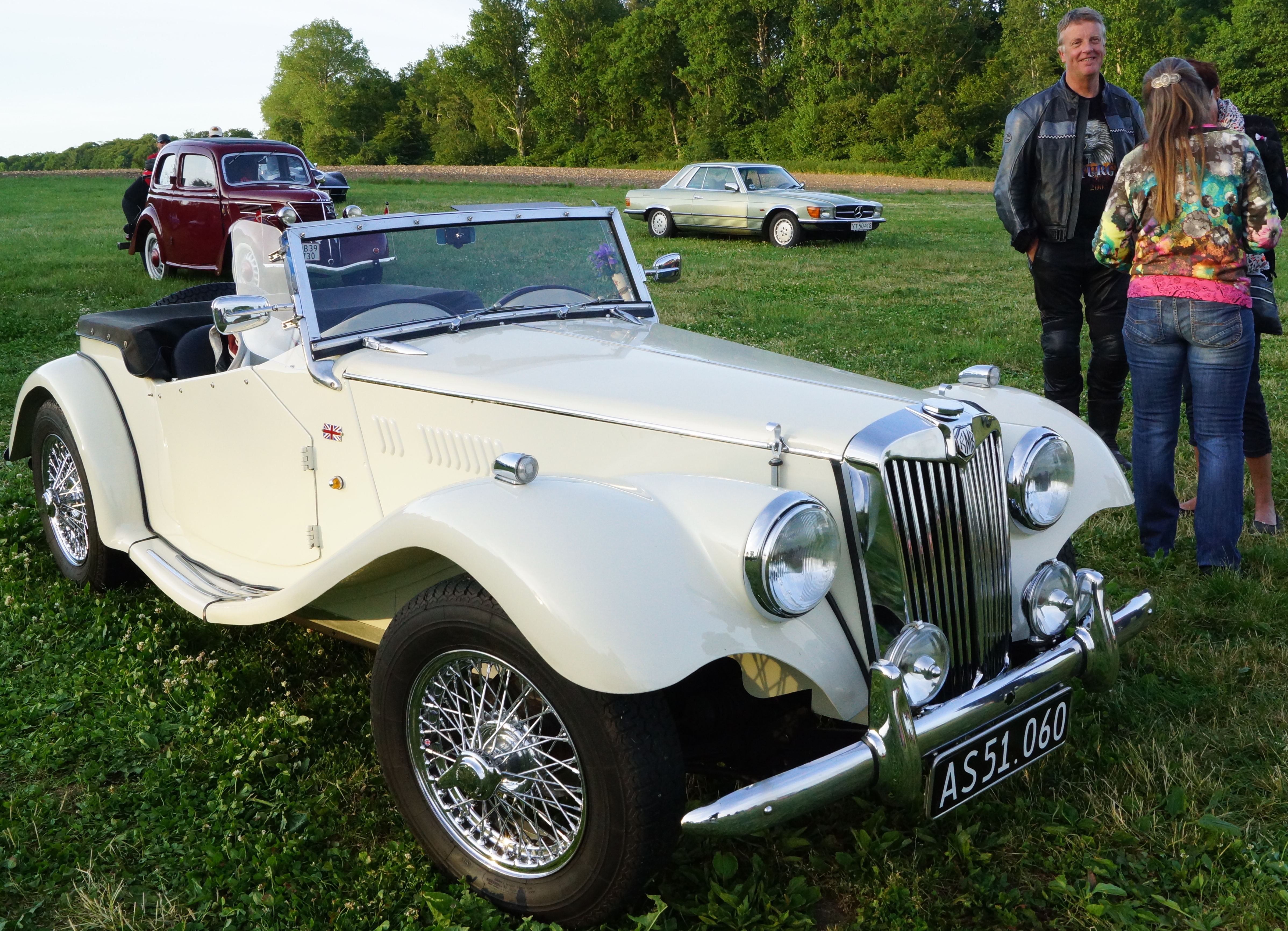 Veteranbil